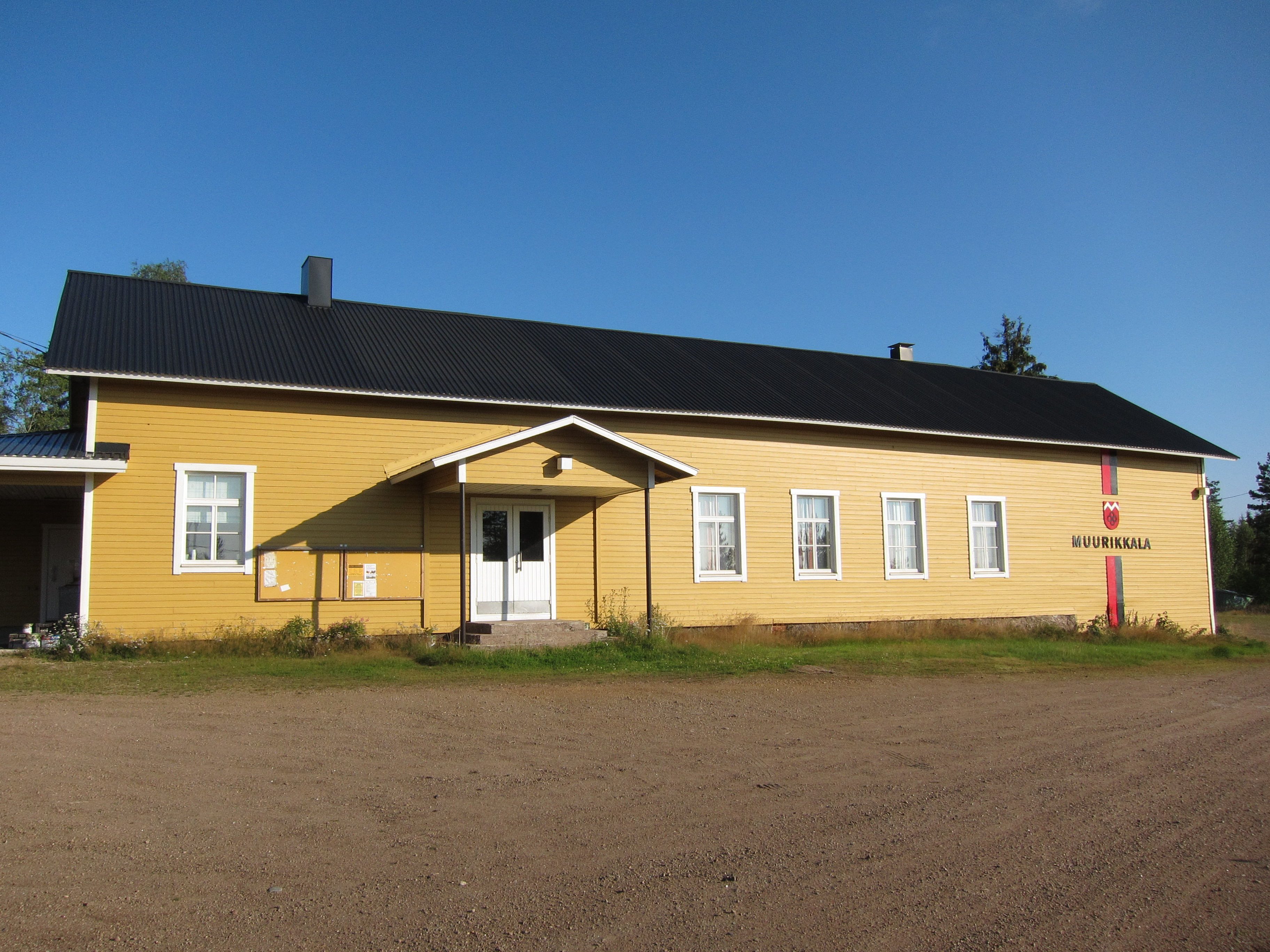 Muurikkalan seurojentalo Miehikkälän kunnassa.